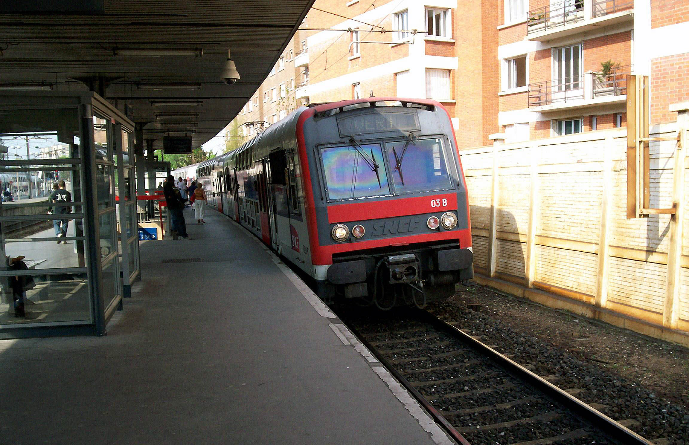 Rame Z8800 arrivant en gare de Saint-Cloud assurant la mission VERI